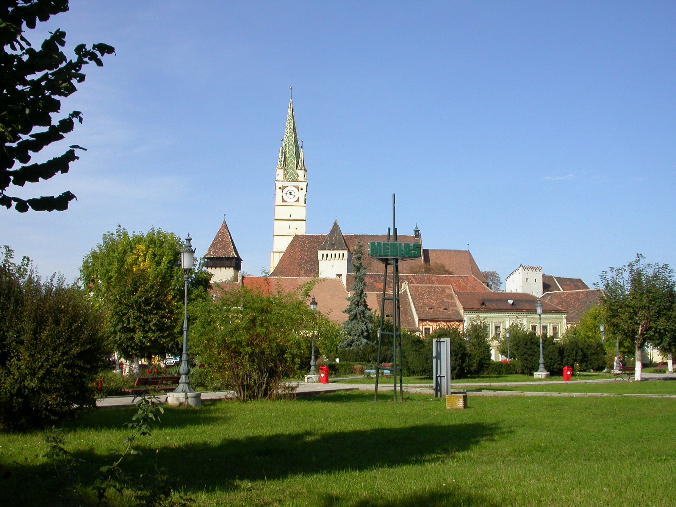 Ansamblul urban "Piața Regele Ferdinand I"